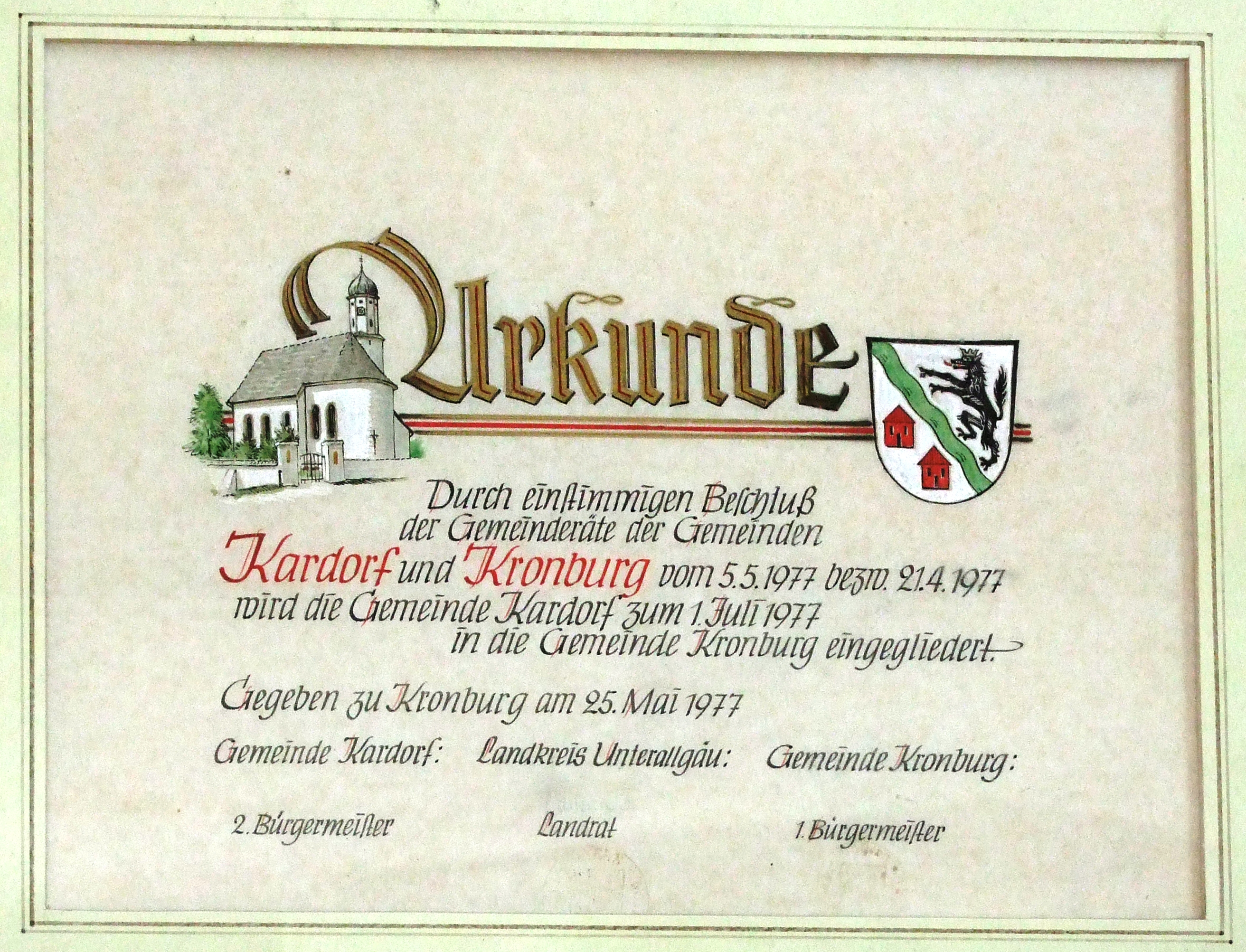 Urkunde zur Eingemeindung von Kardorf nach Kronburg